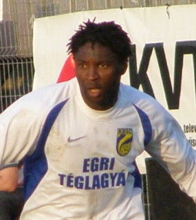 Christian Bodiong Ebala a Kazincbarcika színeiben